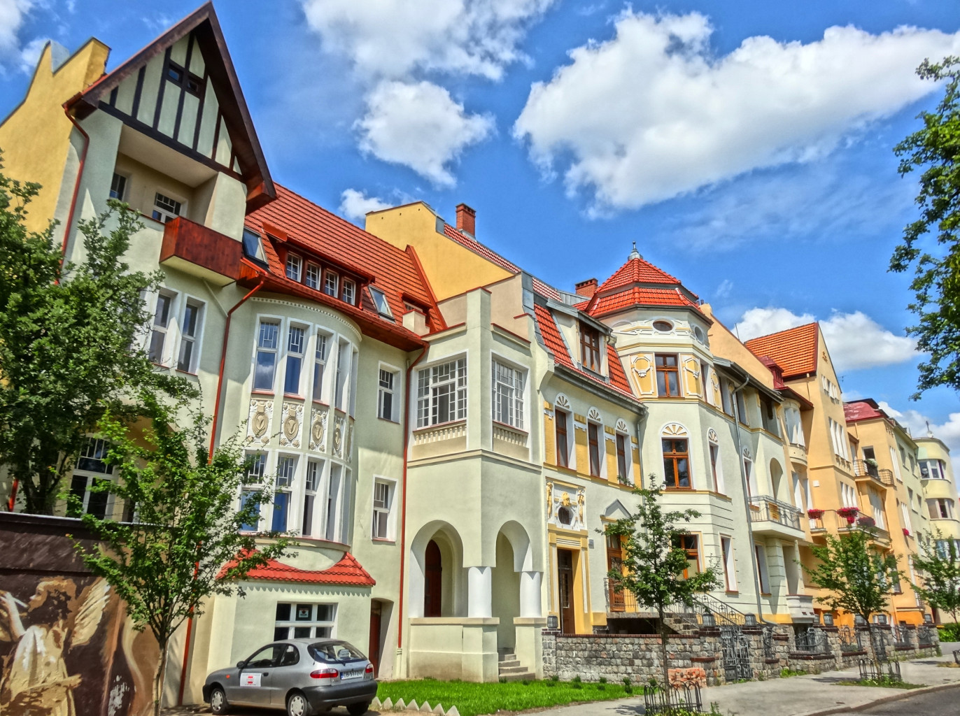 Ulica 20 stycznia 1920 r. w Bydgoszczy. Zabudowa z 1900-1913 r., secesja, wczesny modernizm.